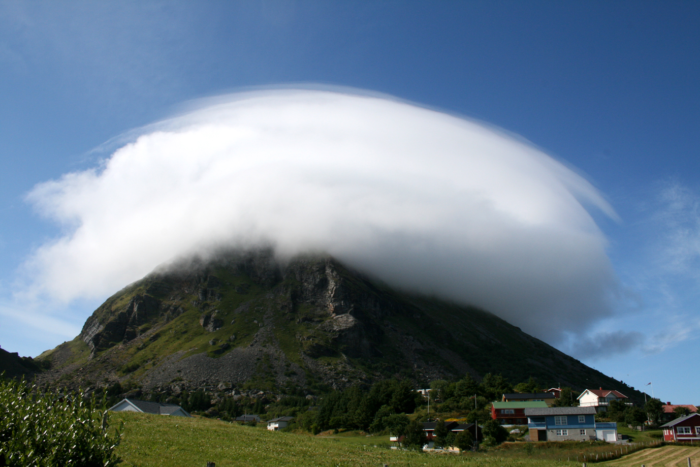 Lovund, Lurøy, Nordland, Norway.